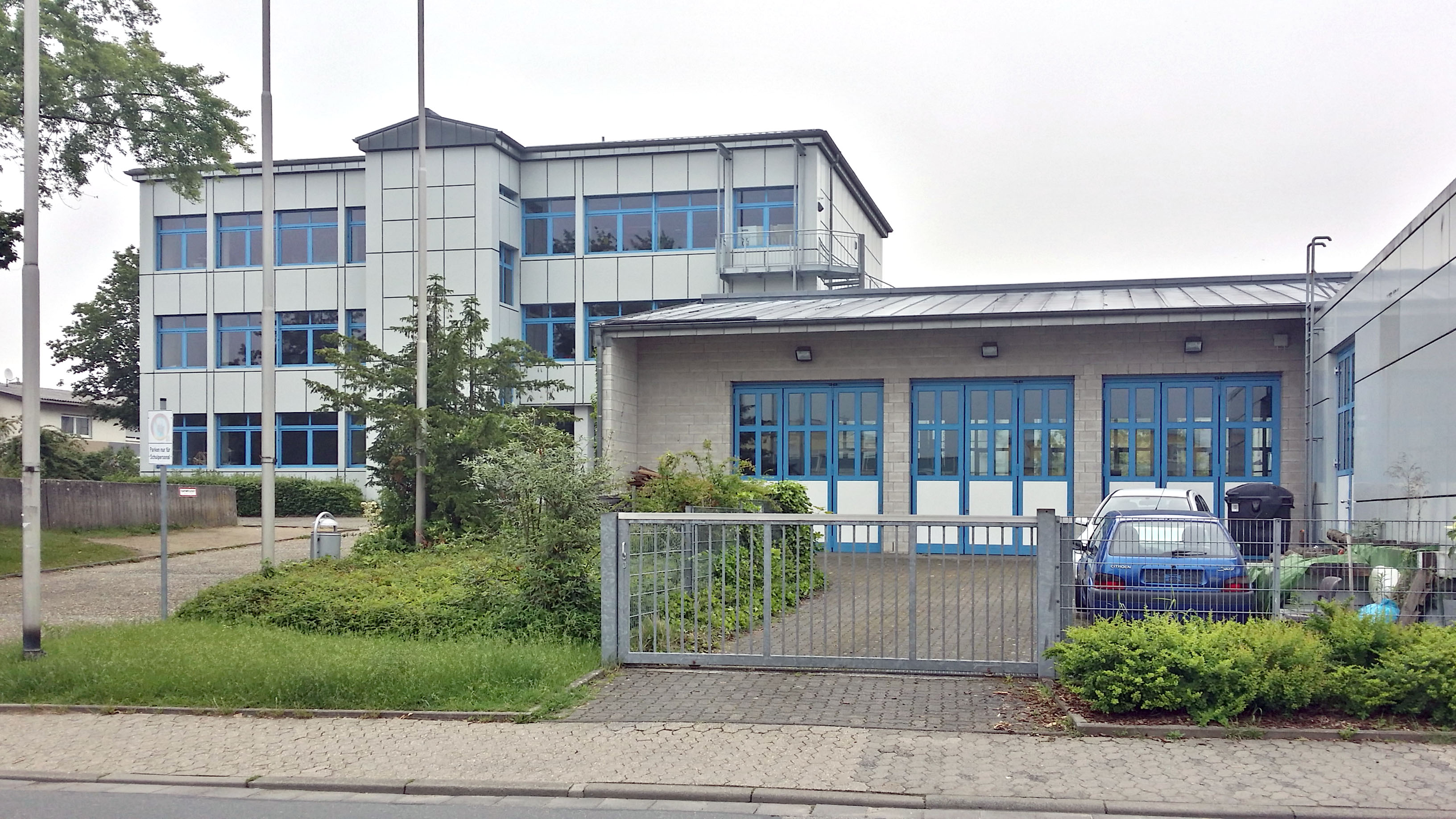 HMS Nebengebäude